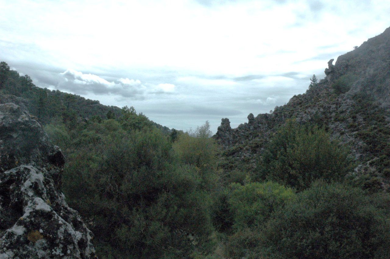 Imagen de la Sierra de Huétor, en la provincia de Granada (España).